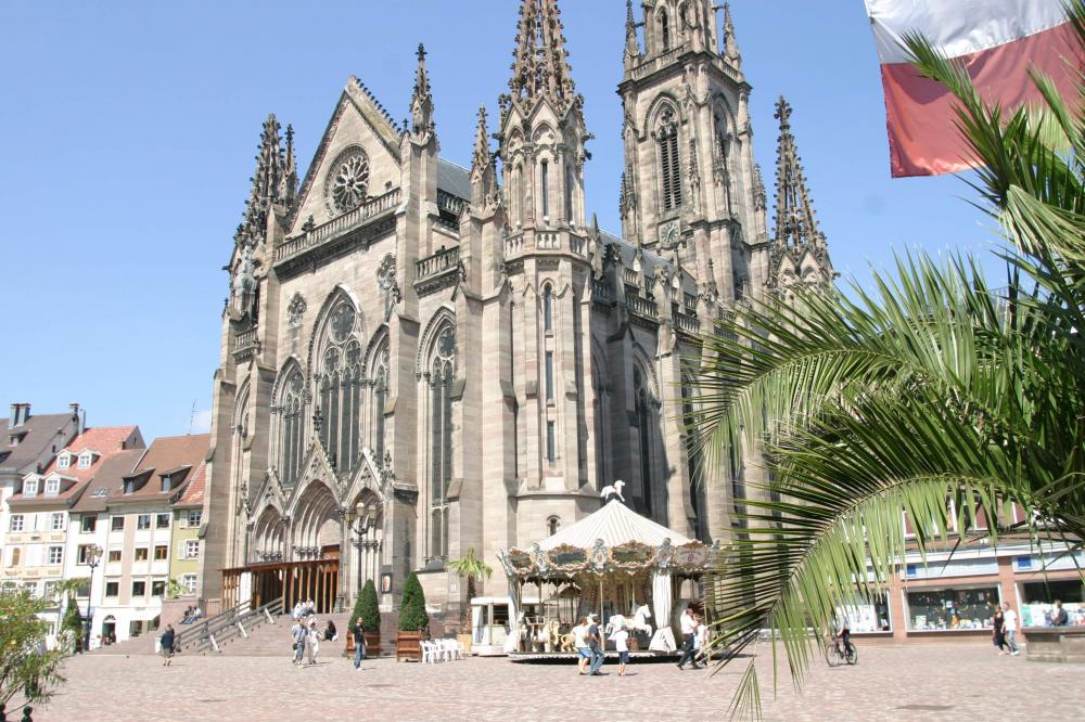 Temple Saint Etienne Place Réunion Mulhouse